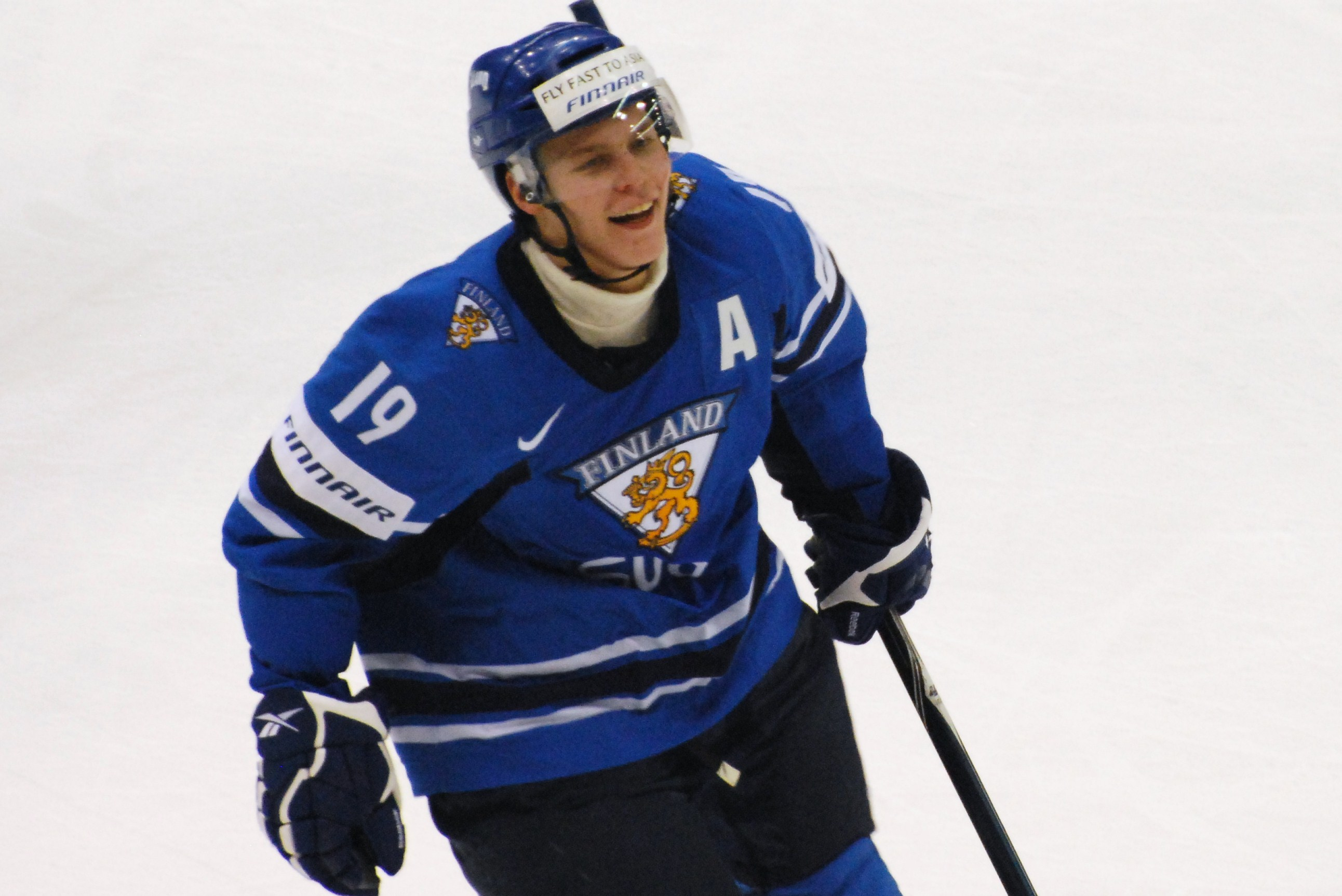 Joonas Rask